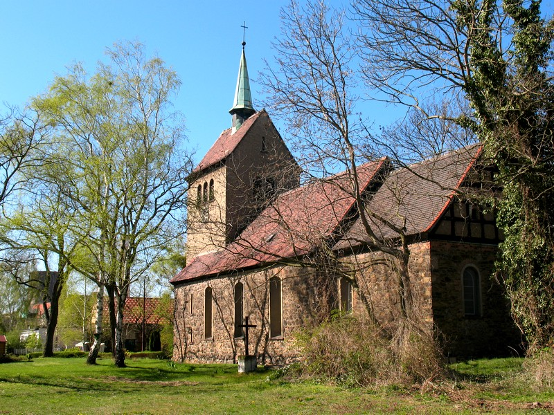 evangelische Kirche Zschornewitz